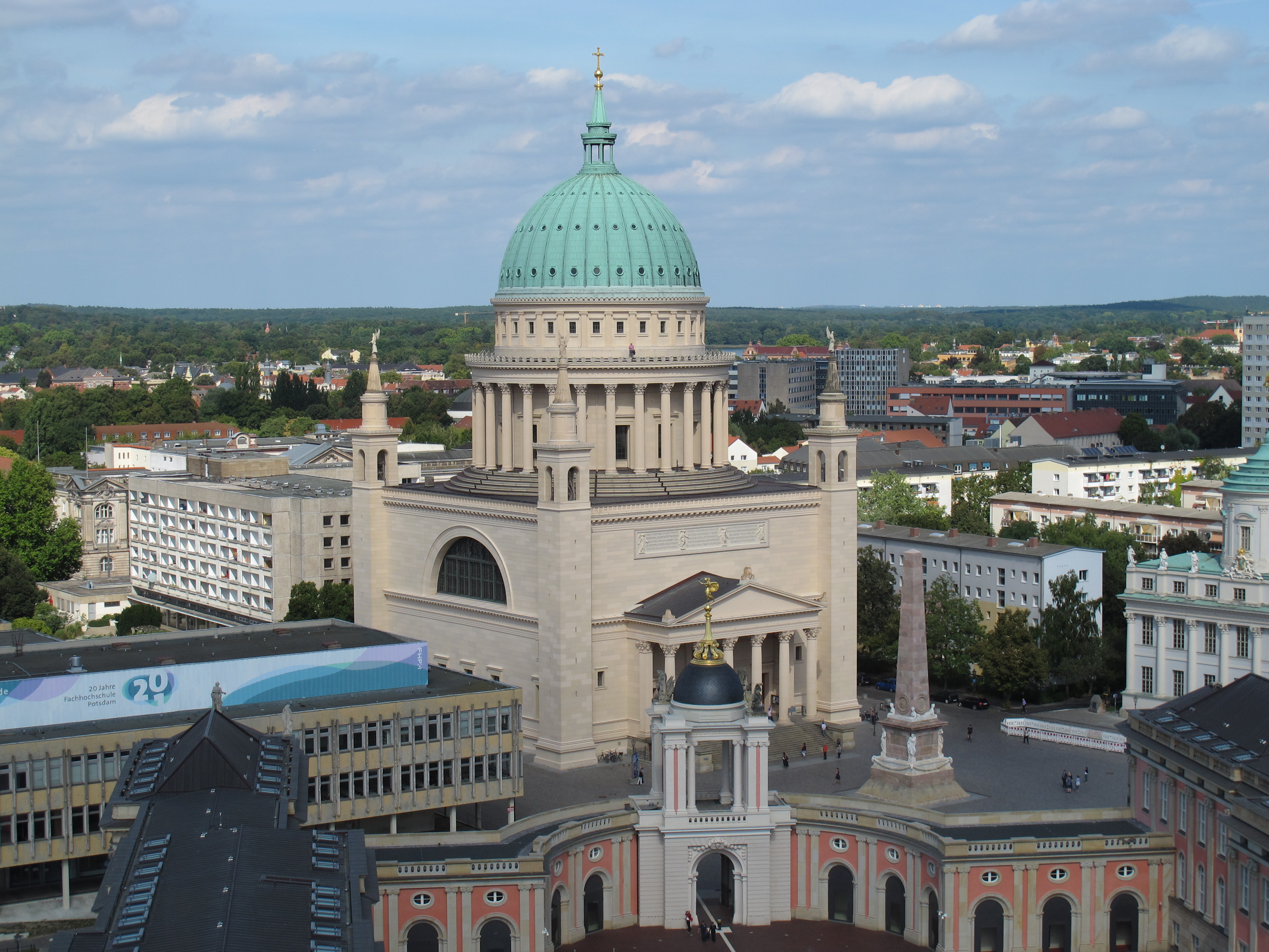 Die Nikolaikirche in Potsdam fotografiert aus dem 17. Stock des Hotel Mercure.